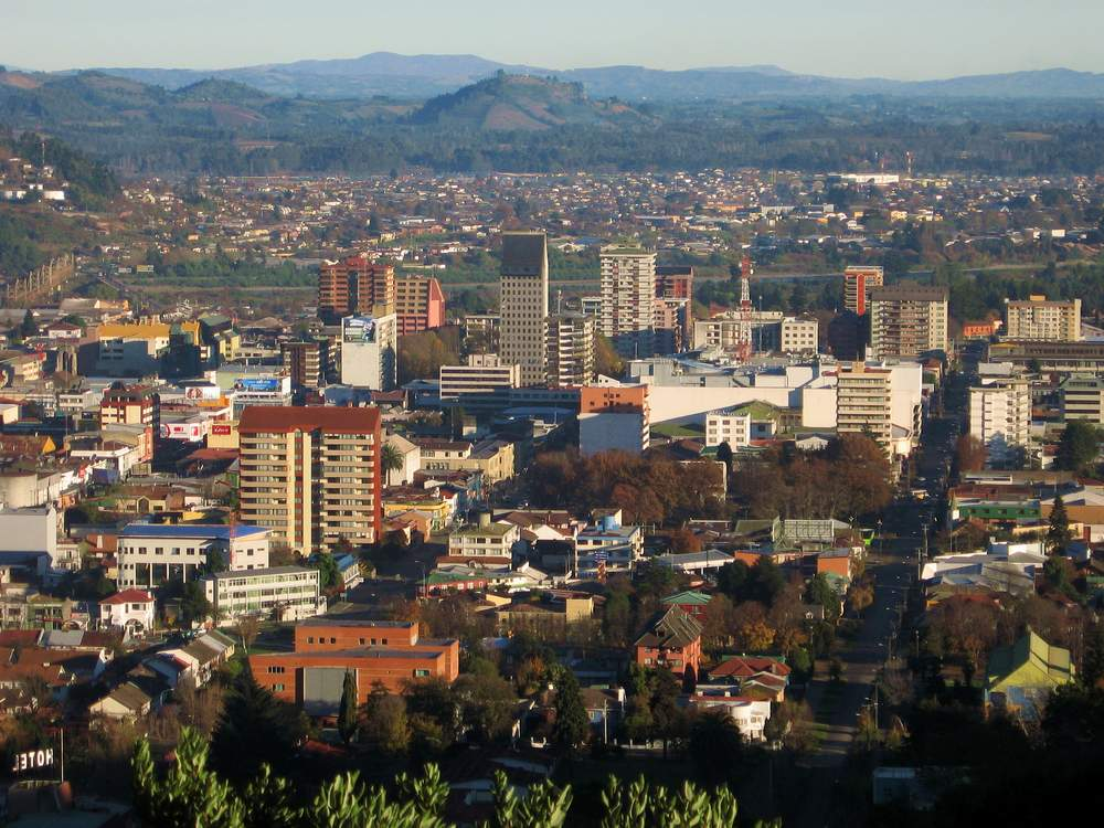 Temuco desde mirador cerro Ñielol